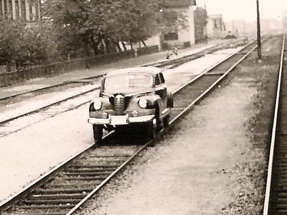 ZiS-110-Draisine der Jugoslawischen Staatsbahn